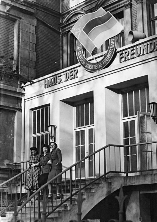 Berlin, Treptow, "Haus der Freundschaft" Illus Rudolph 30.1.1951 Kno-Bl Haus der Freundschaft in Treptow. In Berlin-Treptow, Puschkinallee, wurde eine Landesschule der Gesellschaft für deutsch-sowjetische Freundschaft eröffnet. UBz: Der Eingang zum Haus der Freundschaft